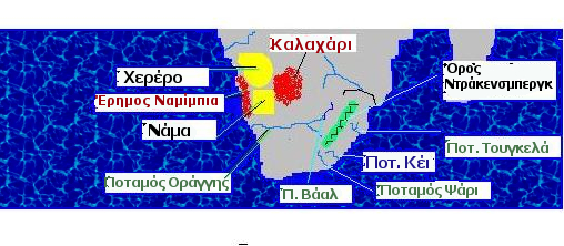 Χάρτης για την θέση του λαού των Νάμα, Ναμίμπια